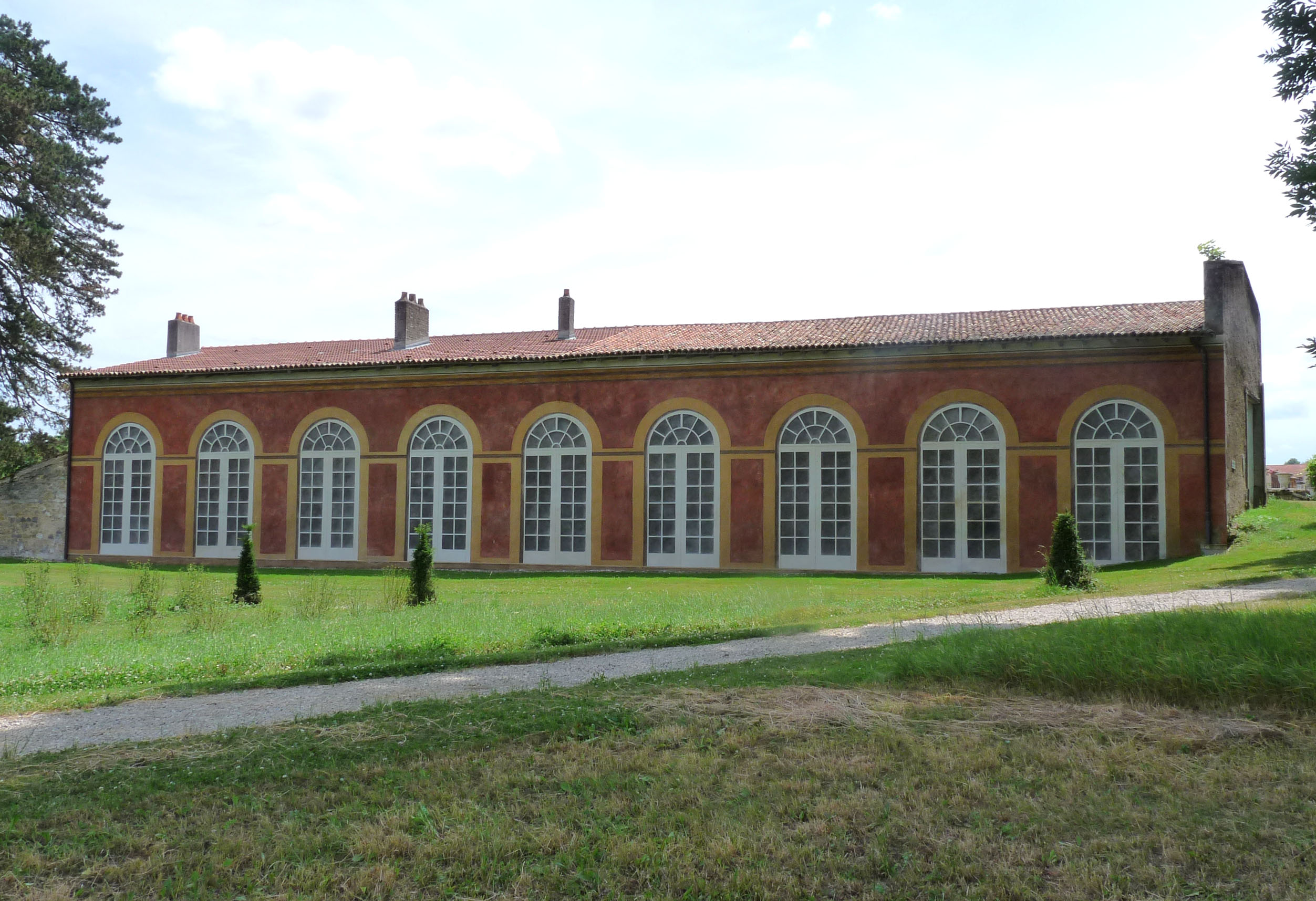 Château de Fléville (Meurthe-et-Moselle) : décor en trompe-l'oeil peint à l'arrière de l'Orangerie, créé vers 1680, restauré en 2004